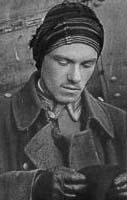 Foto del pilota ed asso tedesco Sebastian Festner